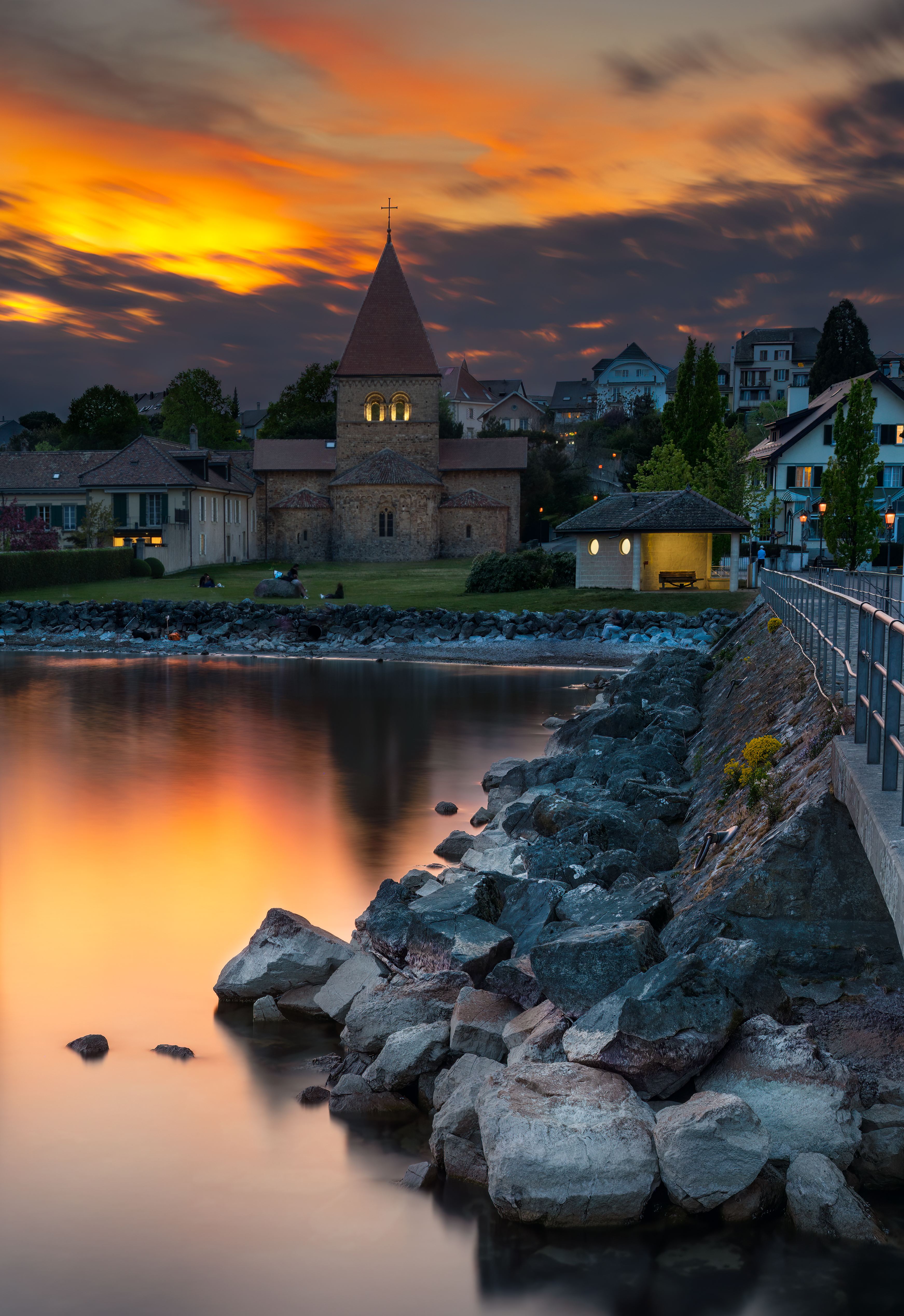 Church of Sainte-Marie-Madeleine, St-Sulpice, VD, Switzerland